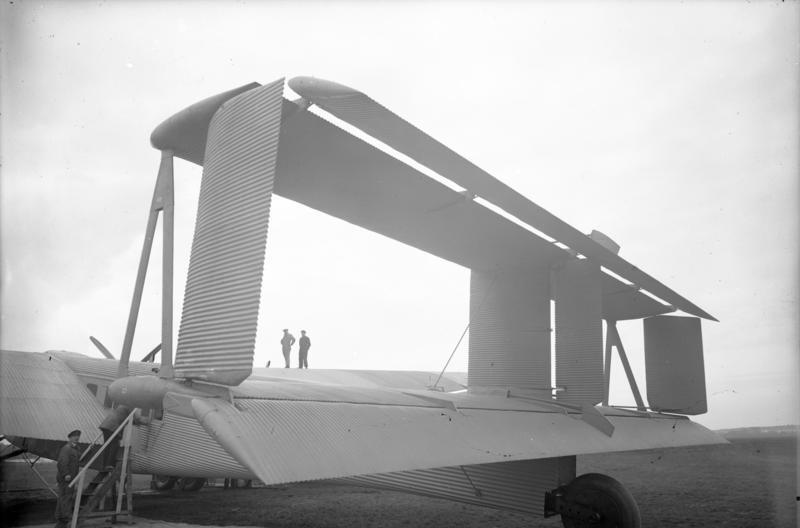 Das Riesen-Schwanzsteuer des grössten deutschen Land-Flugzeuges, des 4 motorigen Junkers G. 38 ! Die gewaltigen Ausmasse dieses Steuers werden durch die beiden Männer auf dem Flugzeug deutlich veranschaulicht.